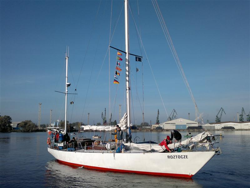 Przygotowanie do zimy 2011